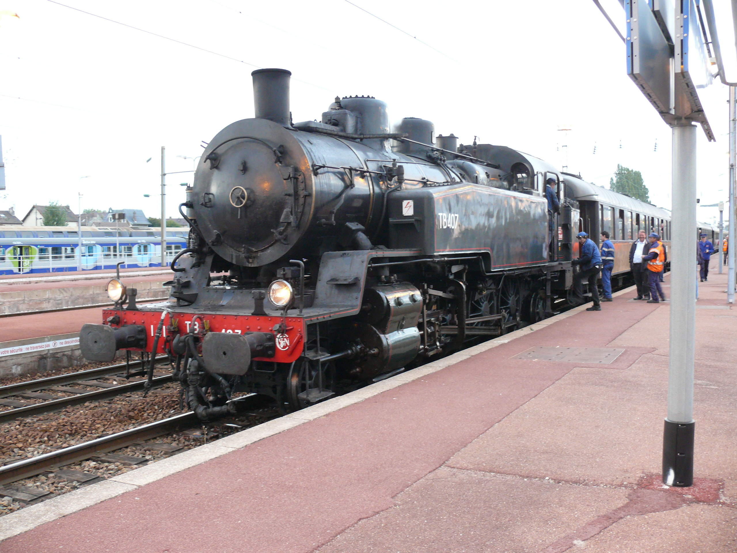 Locomotive SNCF 141 TB 407 (ex Ligne de Vincennes) préservée par l'AJECTA, en gare de Persan - Beaumont